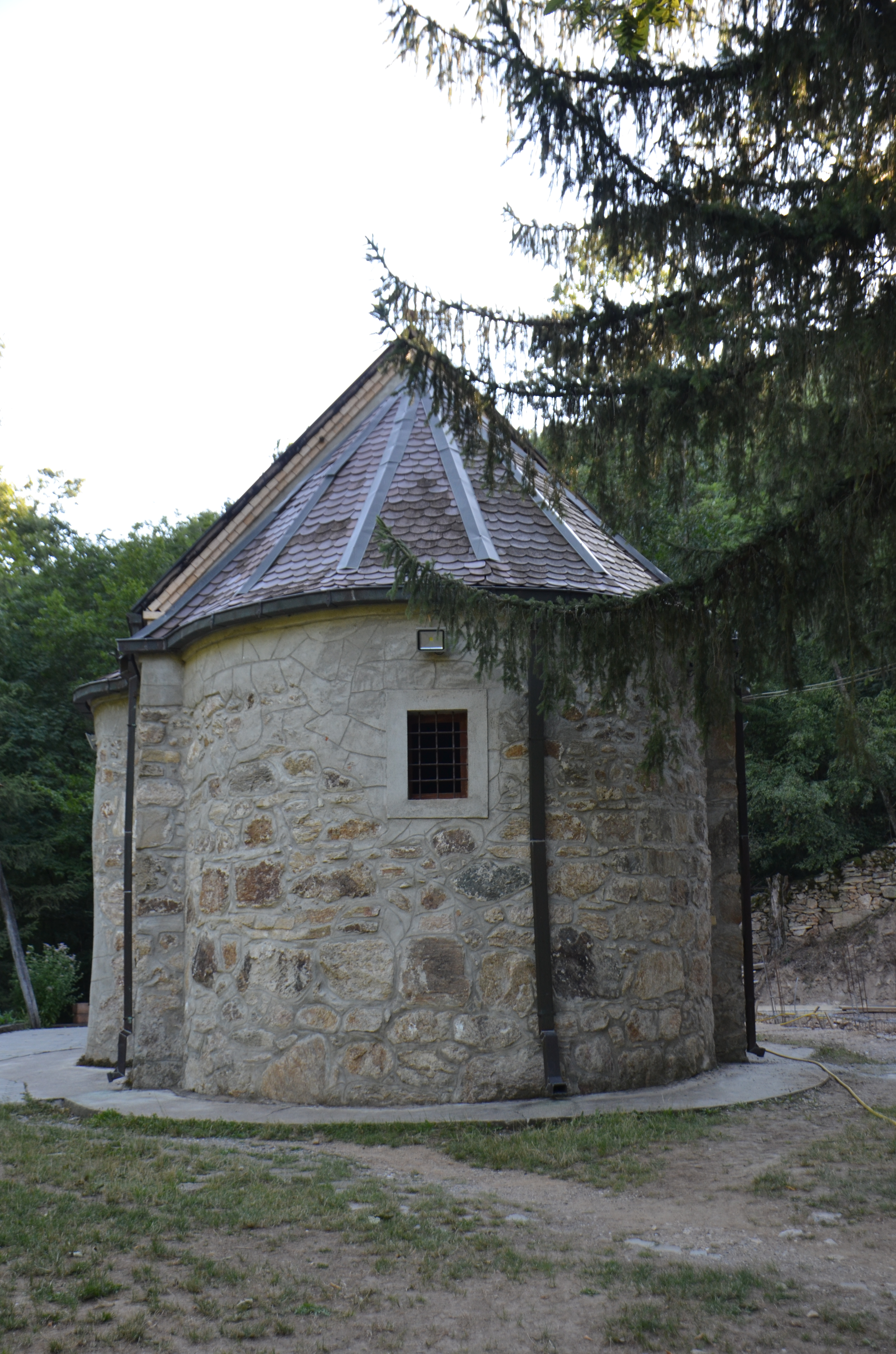 Манастир Својново, општина Параћин, Поморавски округ